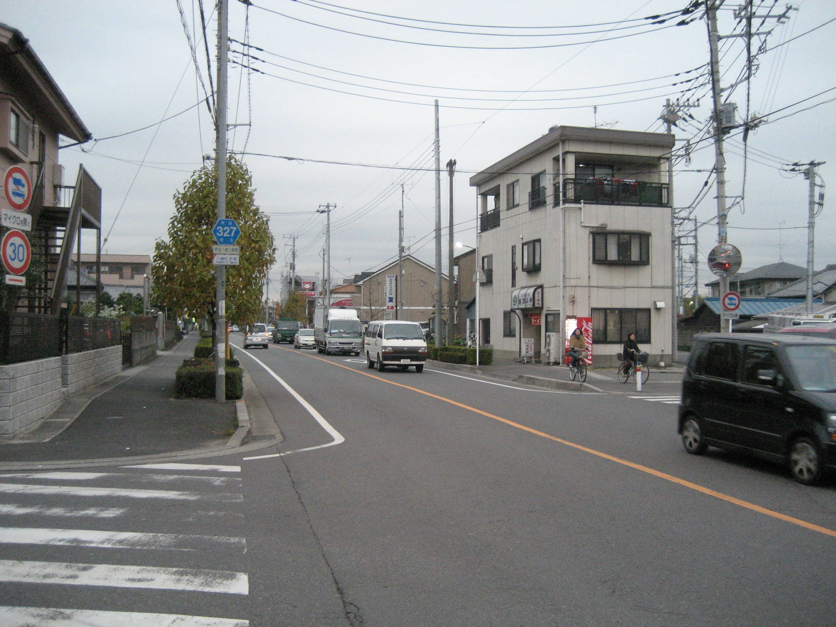 埼玉県道327号八潮市伊草付近